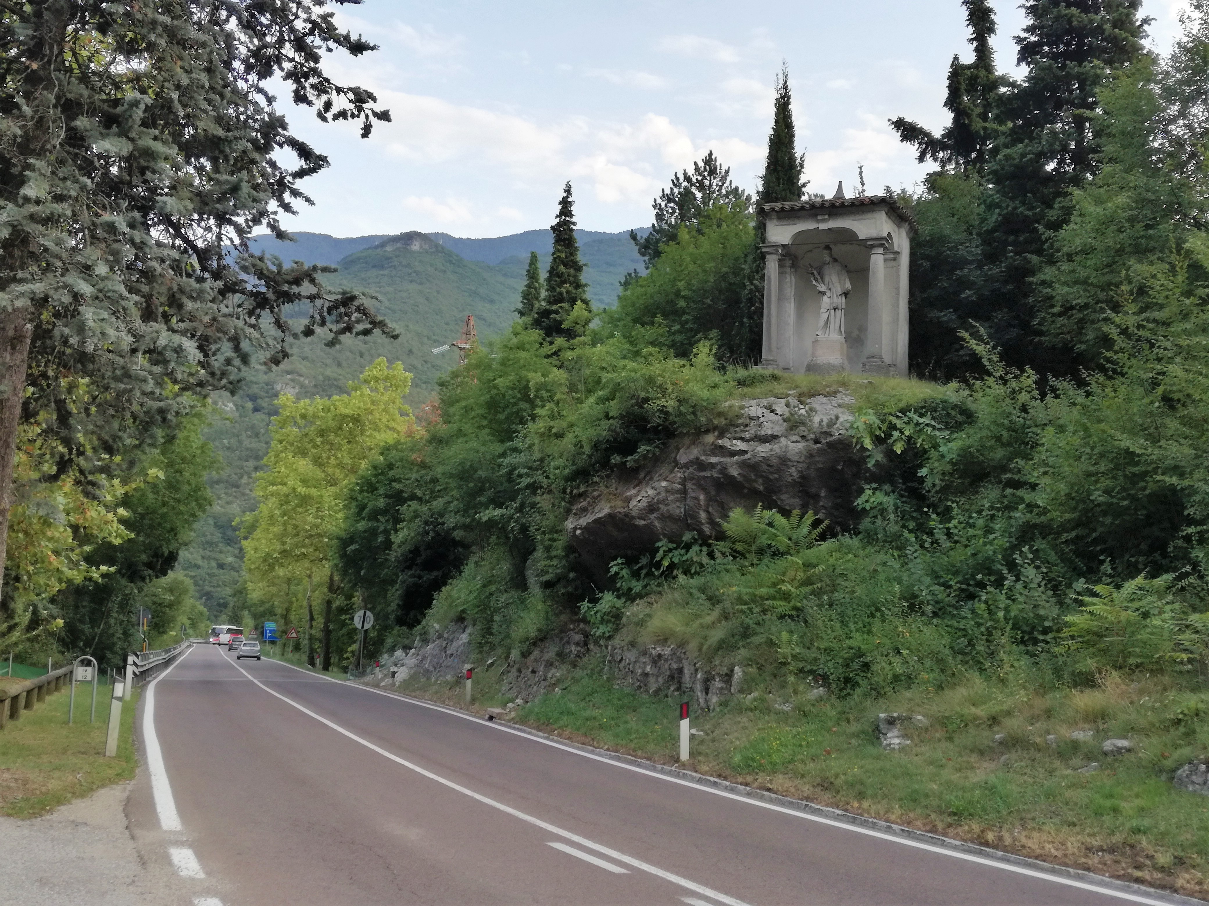 Passo San Giovanni - Schrein mit der Statue des Heiligen Johannes Nepomuk